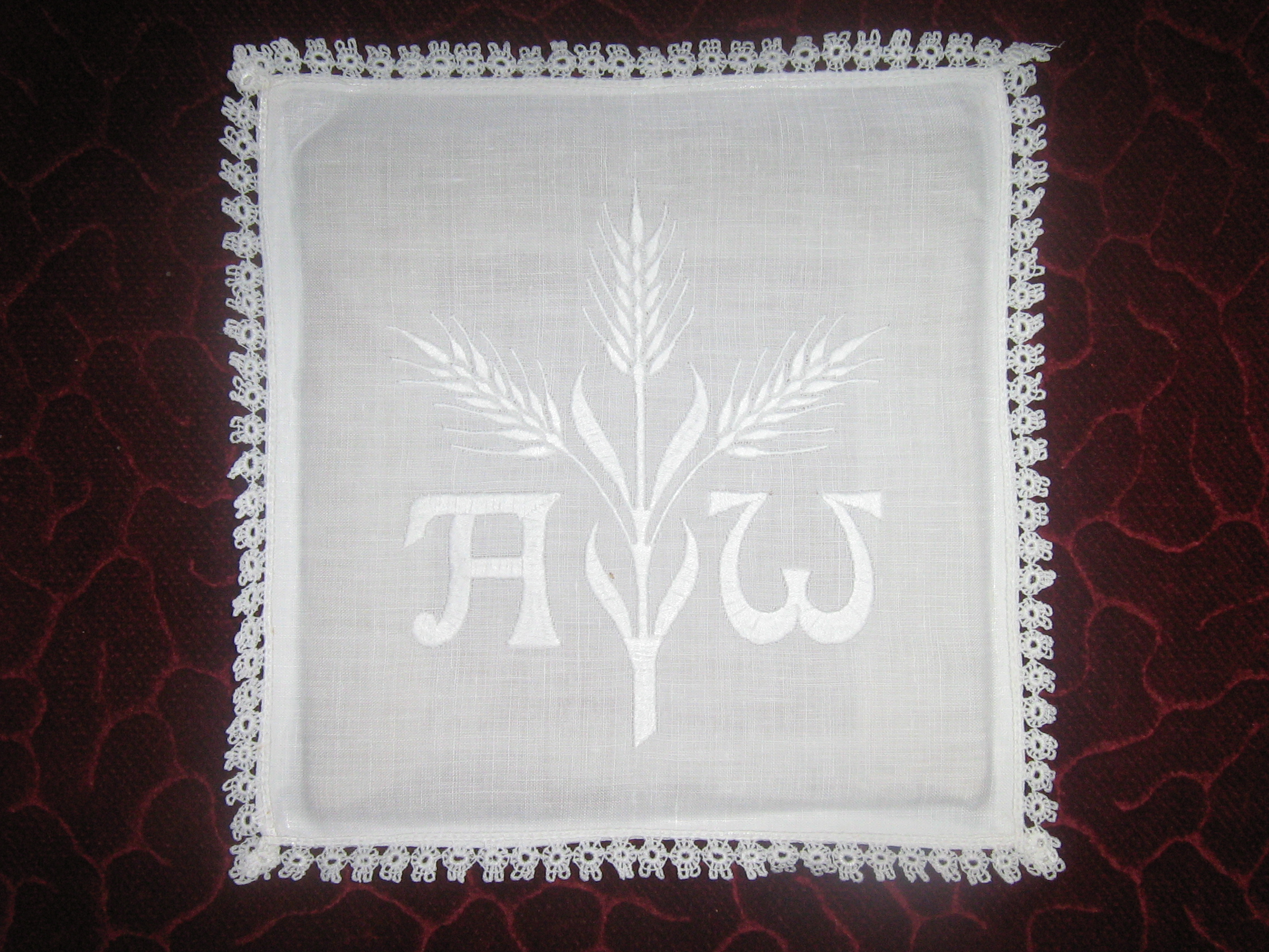 Palka